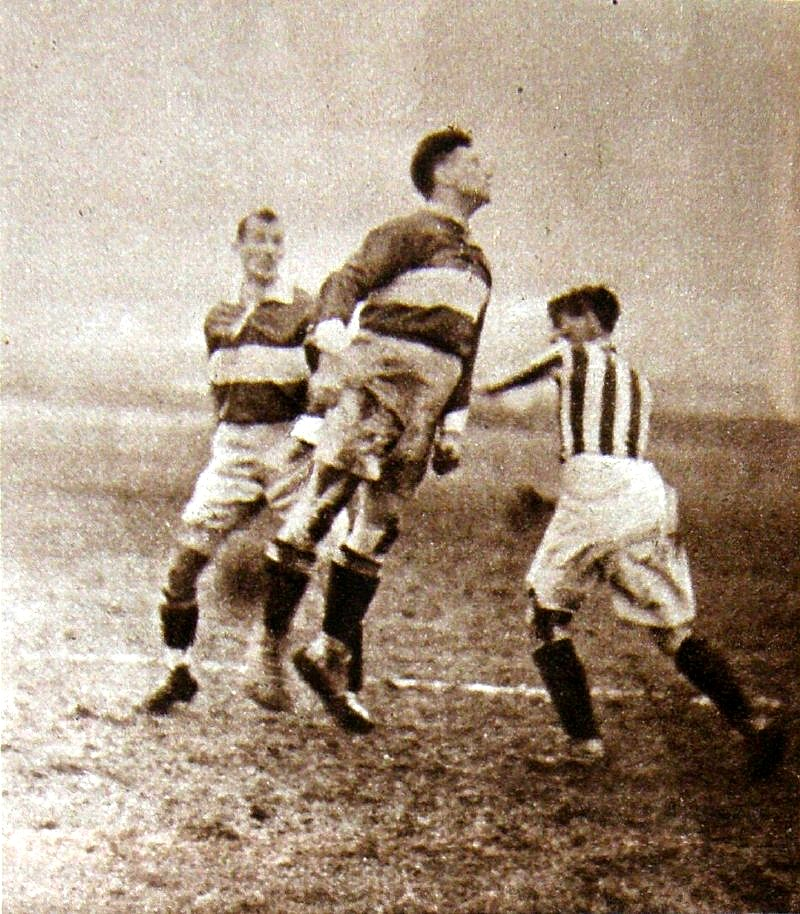 Mecz pomiędzy Cracovią a TKS-em Toruń